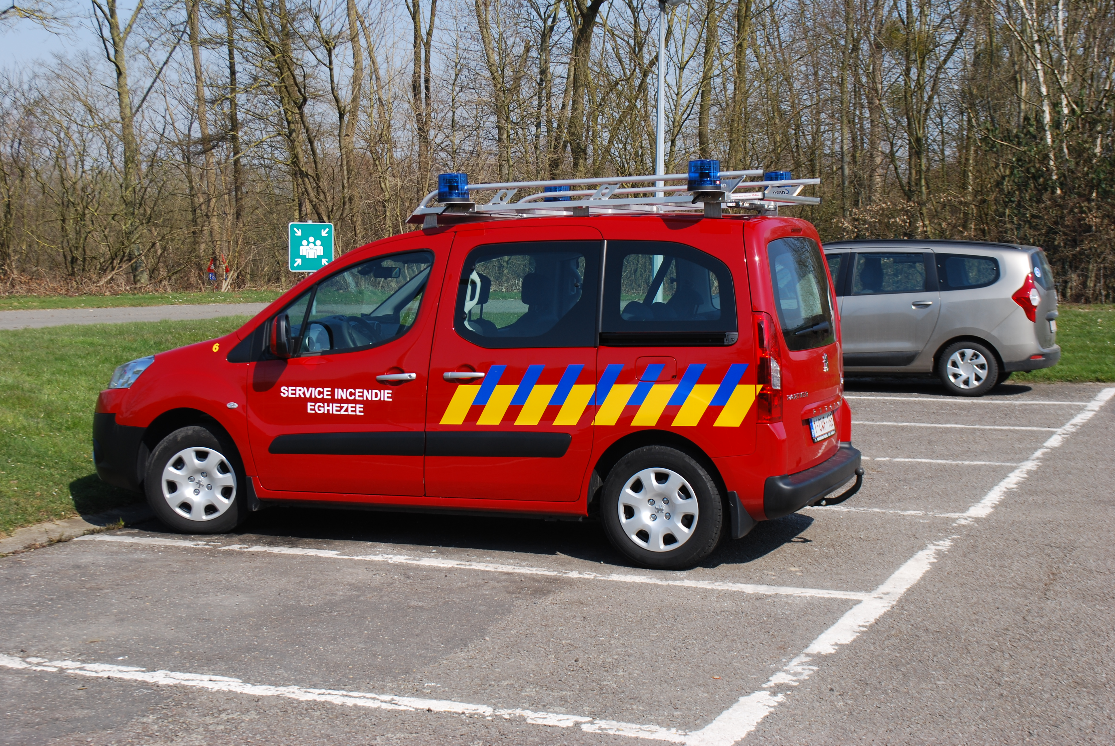 Voitures de pompiers sur le parking de la Ferme expérimentale de l'Université de Liège au Sart Tilman.